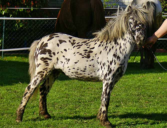 Mini-Appaloosa Stute